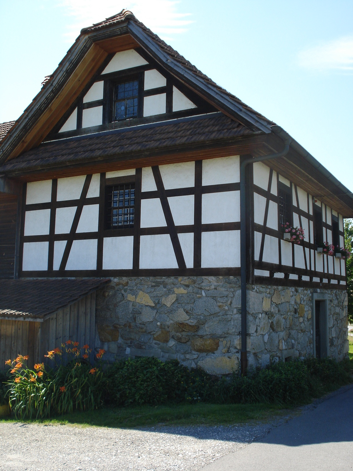 Das Buonaser Ortsmuseum.